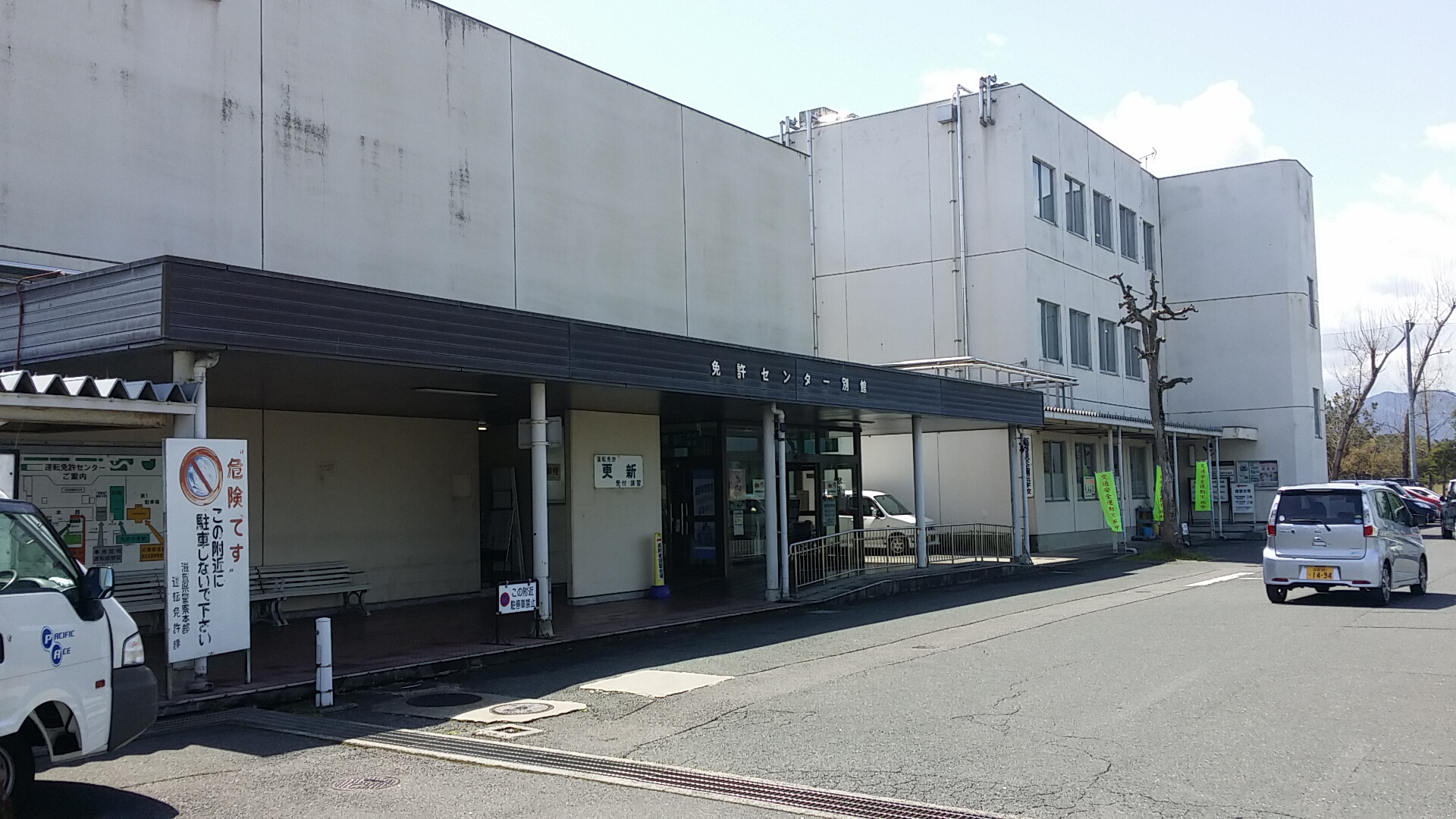 滋賀県運転免許センター別館 外観